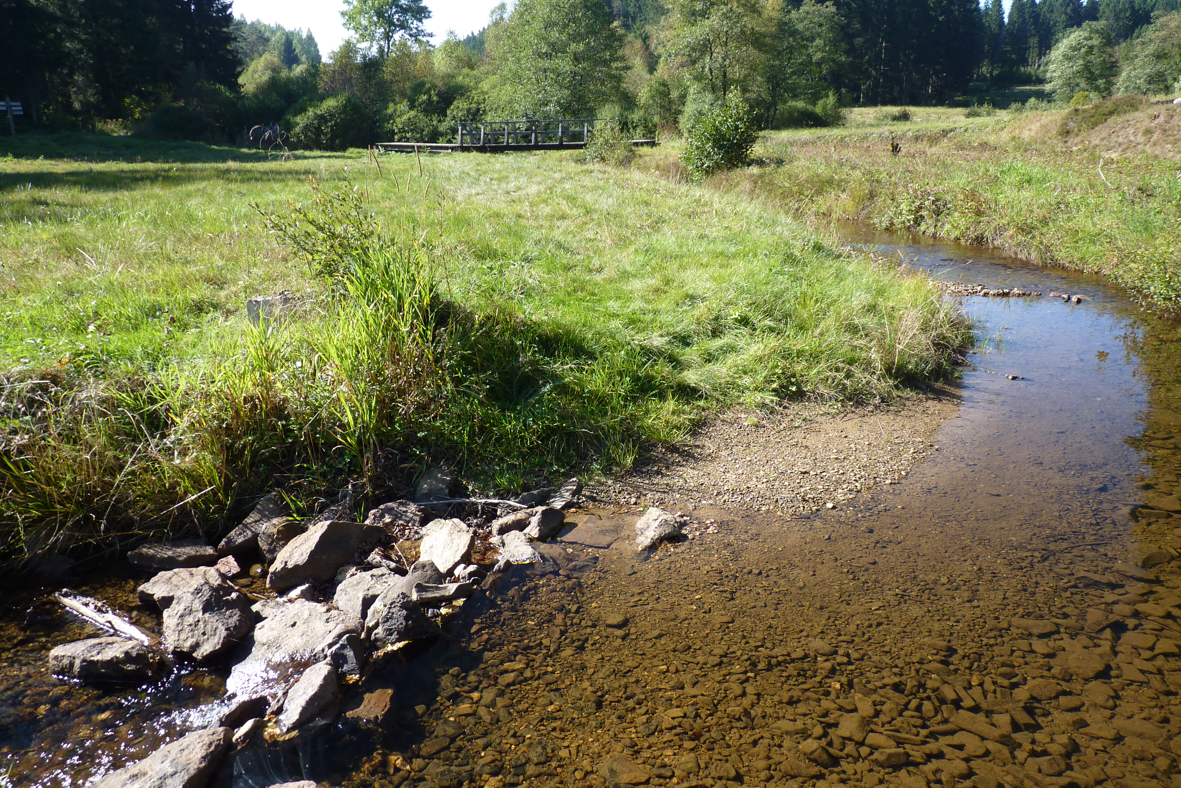 Der Schwarzbach (Röspe) im Naturschutzgebiet „Schwarzbachsystem mit Haberg und Krenkeltal“